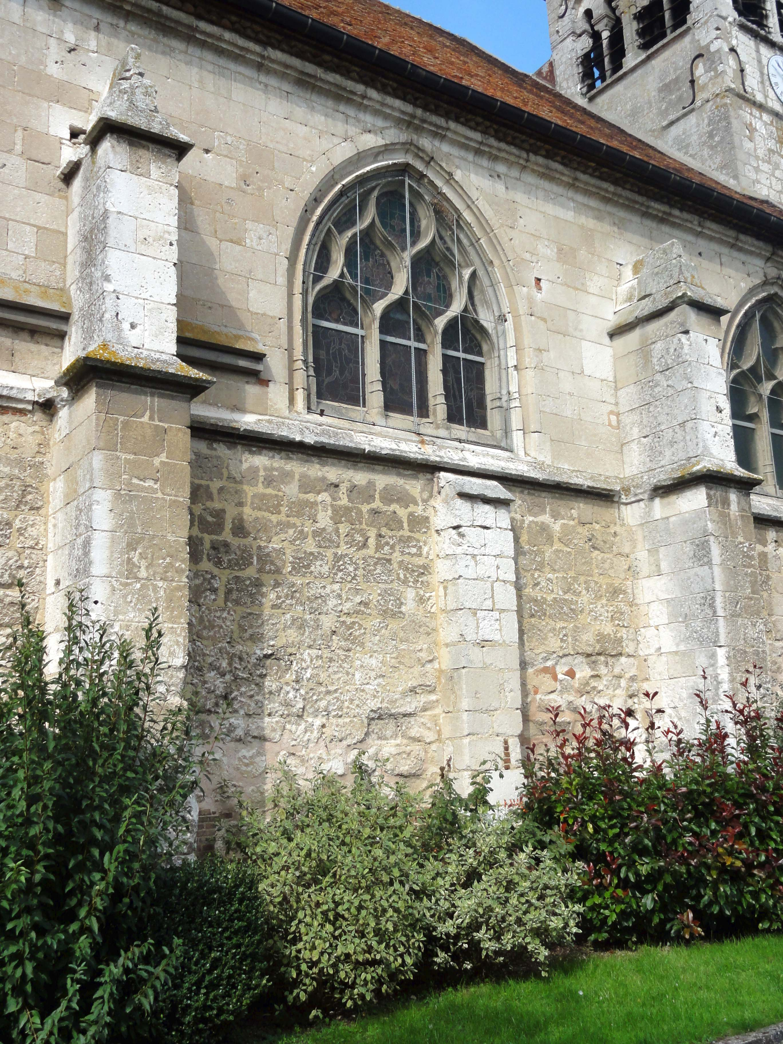 Église Notre-Dame de l'Annonciation - voir titre.